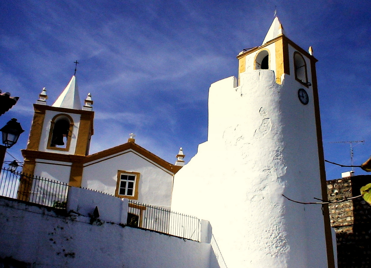 Parte dos muros do castelo de Alegrete - Portalegre